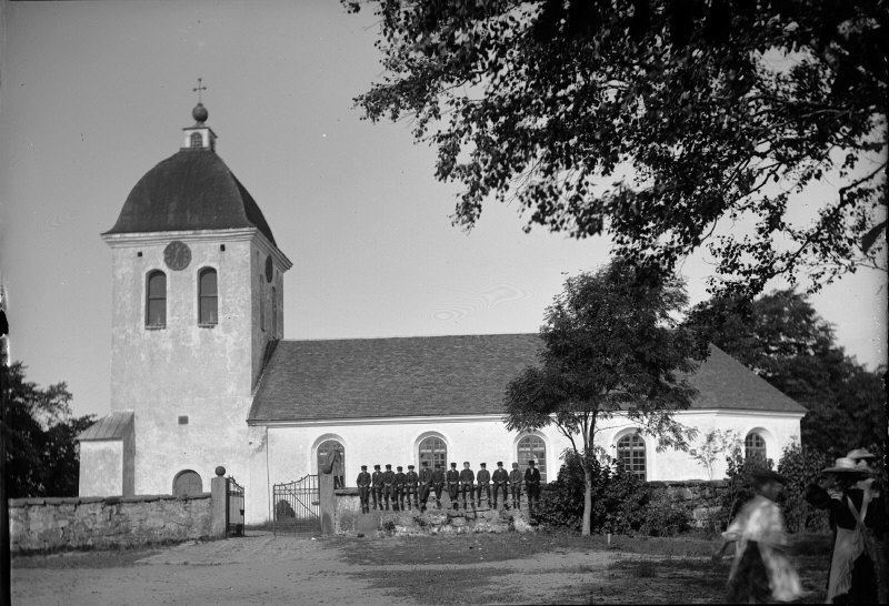 Kyrkan från söder. Snabbinv. Kategori: (01) ExteriörerKyrkan från söder. Snabbinv.